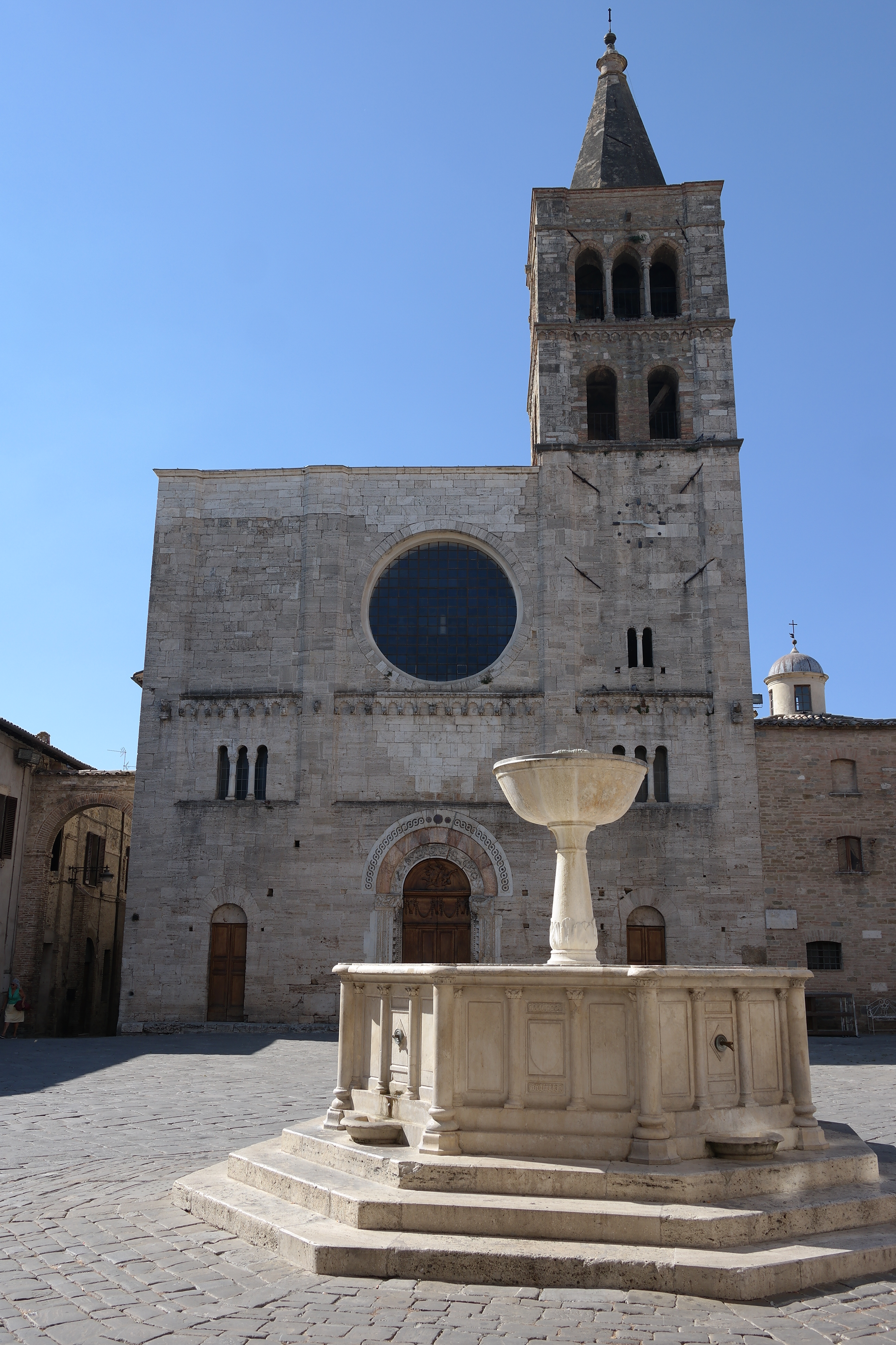 Interno della Chiesa di San Michele a Bevagna